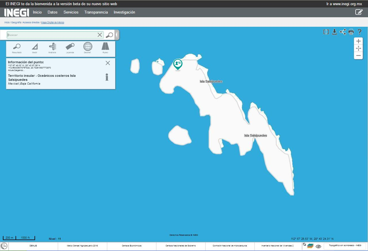 Representación cartográfica hecha por el INEGI de Isla Salsipuedes.